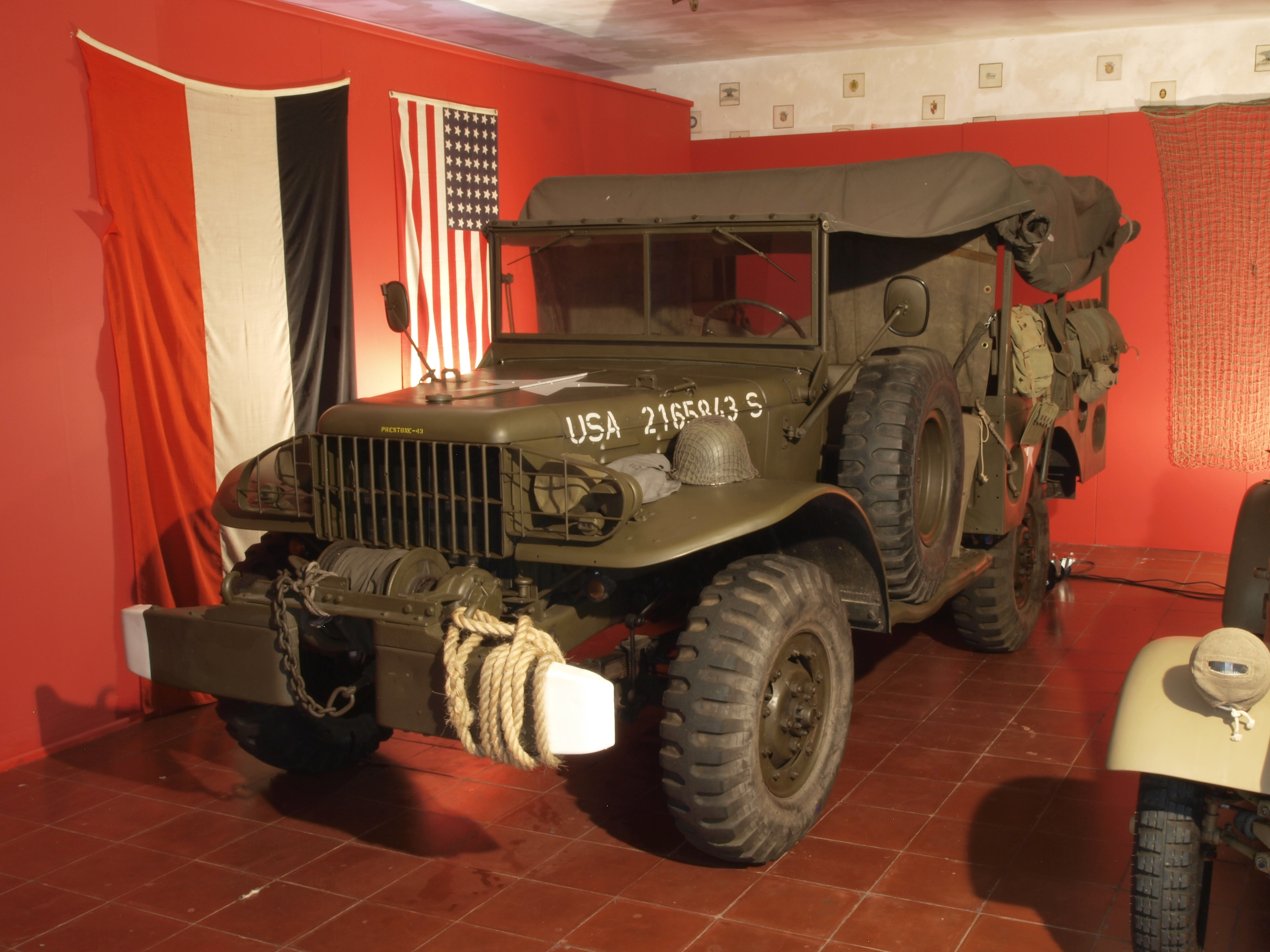 Photographed at the Caramulo museum, 'Museu do Caramulo', Caramulo, Portugal. OLYMPUS DIGITAL CAMERA